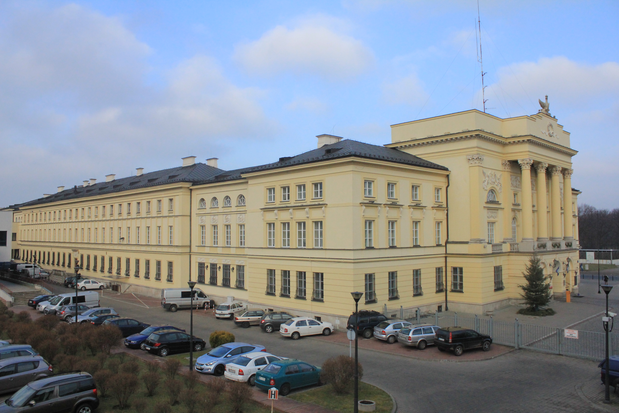 Pałac Mostowskich w Warszawie - południowy narożnik